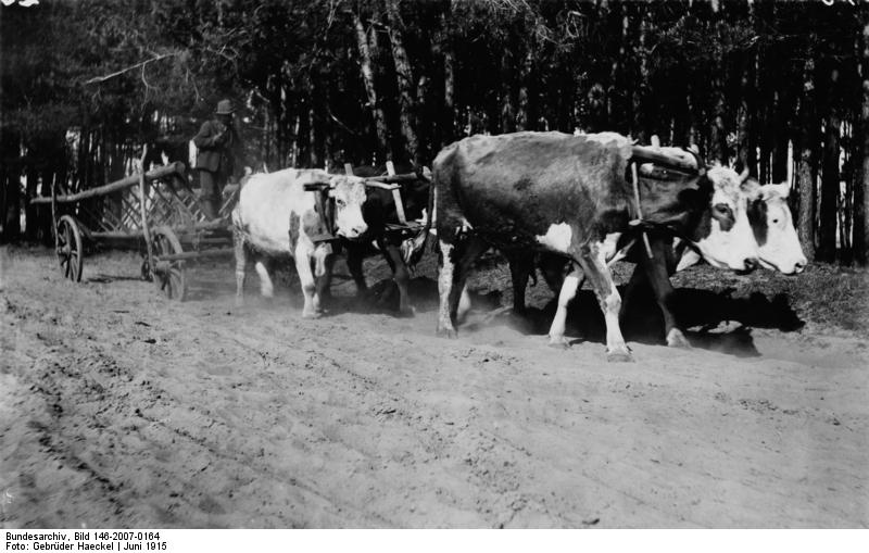 Ochsengespann eines polnischen Bauers. Aufgenommen bei Wloclawek a. d. Weichsel im Juni 1915.